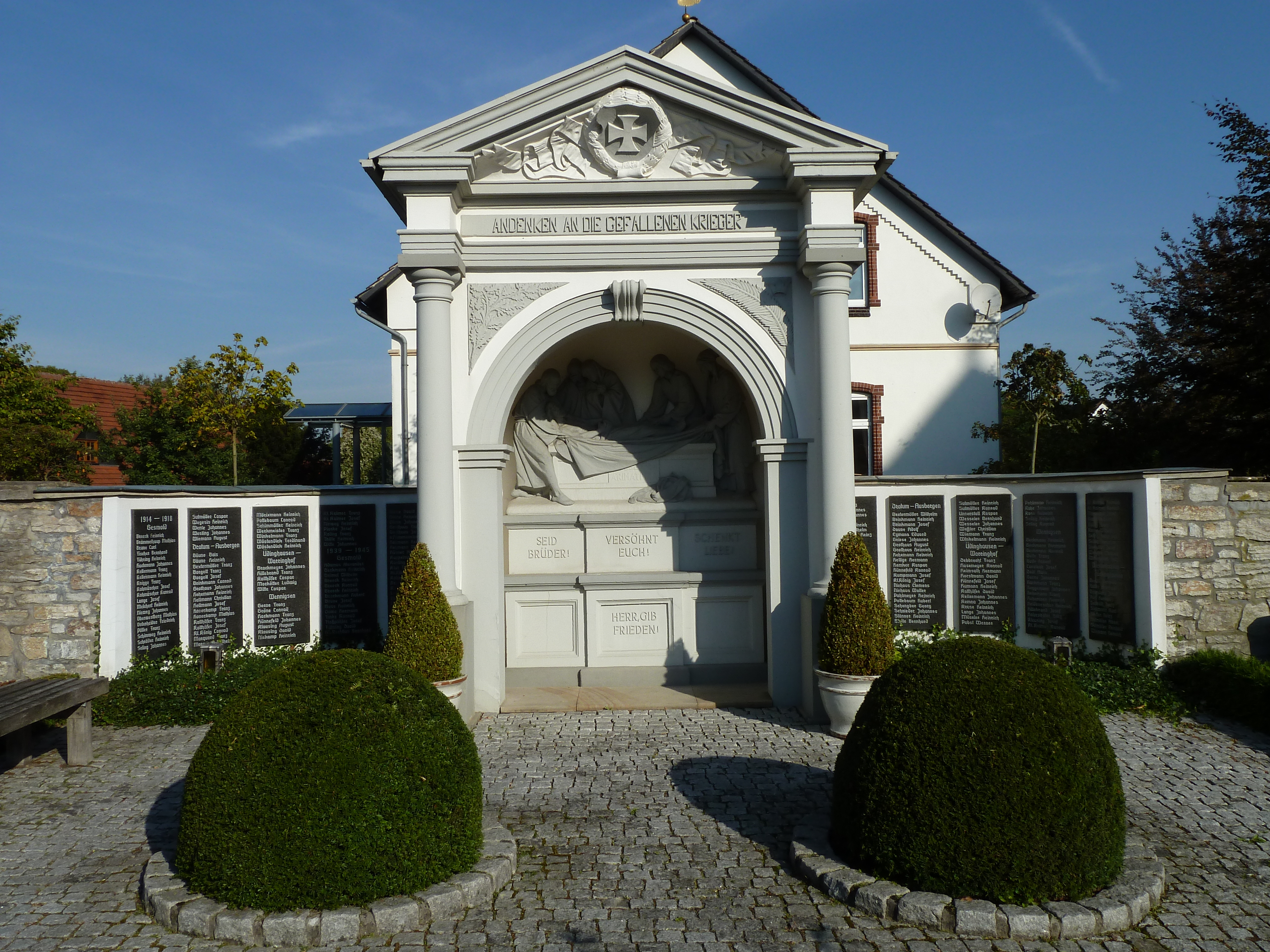 Gedächtnis Kapelle auf dem Gesmolder Friedhof, neben der St. Petrus Kirche. Auf er Rückseite der Kapelle befindet sich der Mutter-Anna-Altar. Im Bildhintergrund befindet sich fdas ehemalige Pfarrhaus, heute Pfarrzentrum.